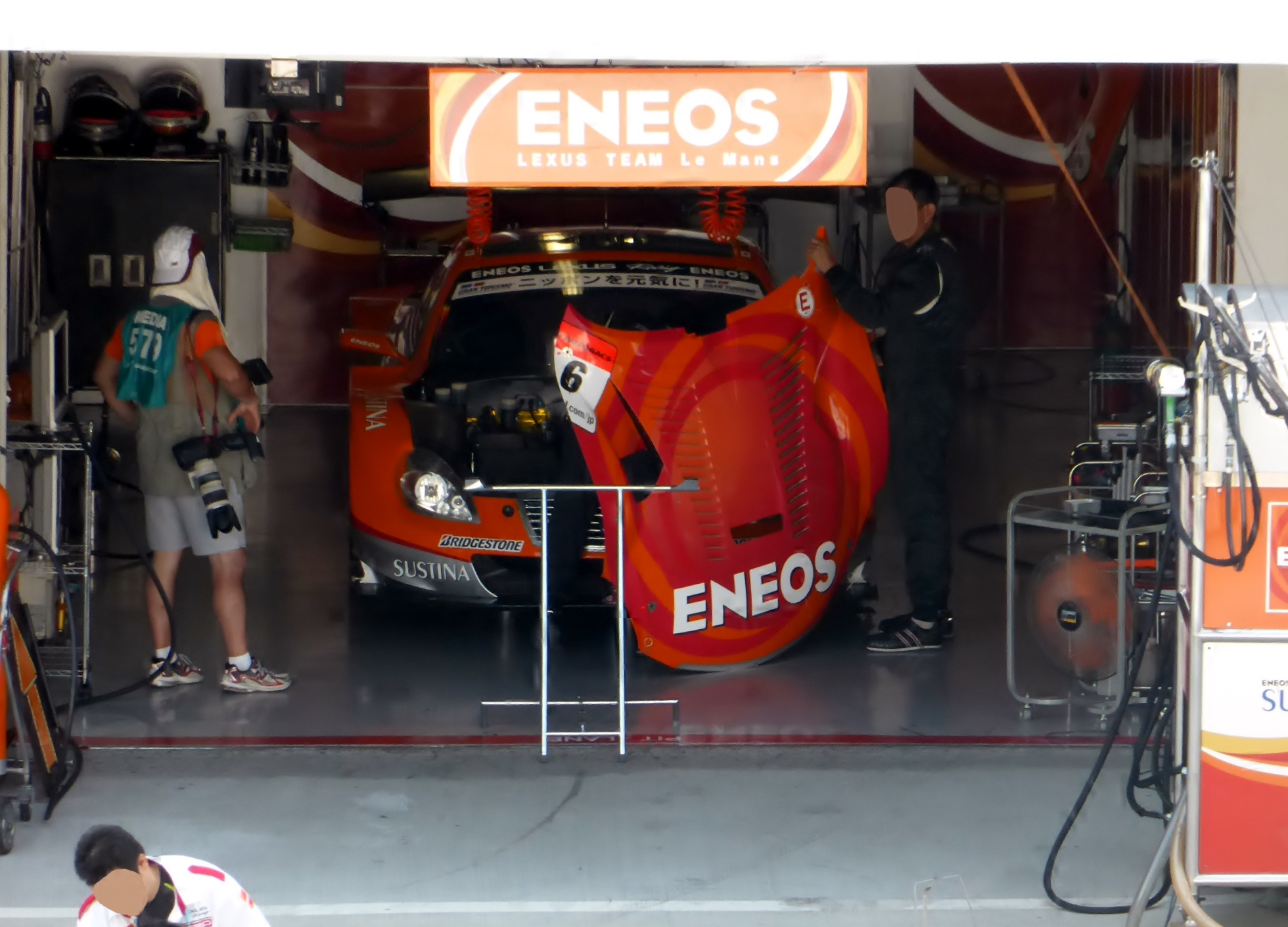 2013年度ポッカサッポロ1000㎞におけるENEOS SUSTINA SC430を撮影。後日みんカラにもアップロード予定。